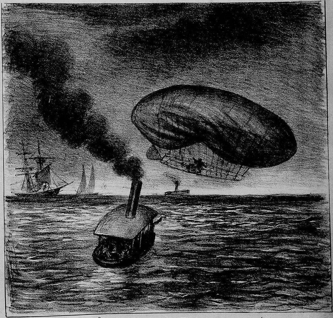 Legenda original: "Nova victória do Santos Dumont. Tendo rasgado seu balão, desceu descrevendo longa spiral, dando tempo a que as embarcações viessem recebê-lo. Ao saltar em terra sob indescreptível ovação, foi elle felicitado pelo povo. Isto passou-se hontem 14 de Fevereiro de 1902.